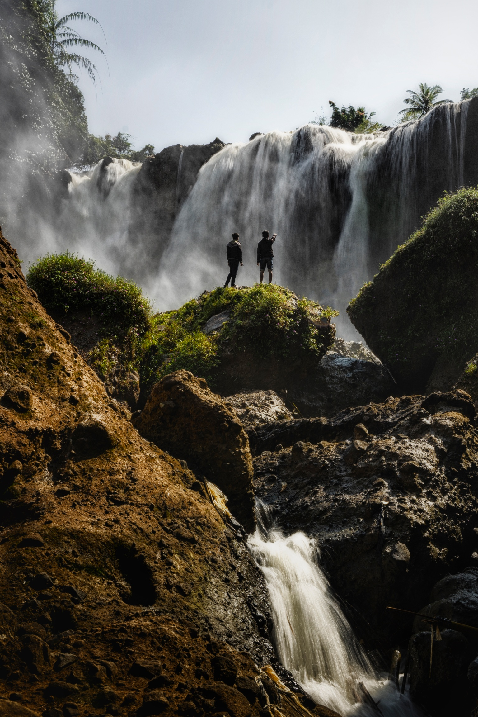 Air Terjun Dadali terletak di Kampung Lebaksaat, Desa Wargaasih, Kecamatan Kadupandak, Cianjur Selatan. Untuk dapat sampai kemari kamu harus menempuh perjalanan dengan kendaraan bermotor sekaligus berjalan kaki hingga sampai ke lokasi